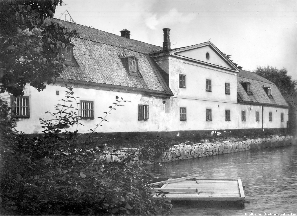 Husarstallarna uppfördes 1776-77 och var kronobränneri till 1787 och därefter kronomagasin. Till riksdagarna i Örebro 1810 och 1812 snyggades byggnaden upp och användes då som riddarhus för adelsmännen. Från 1836 tjänade huset som kasern för kongl. Livregementets husarkår, Närkes husarer, med stall i bottenvåningen och logement i övervåningen. Byggnaden revs 1912 för att ge plats åt centralparken.